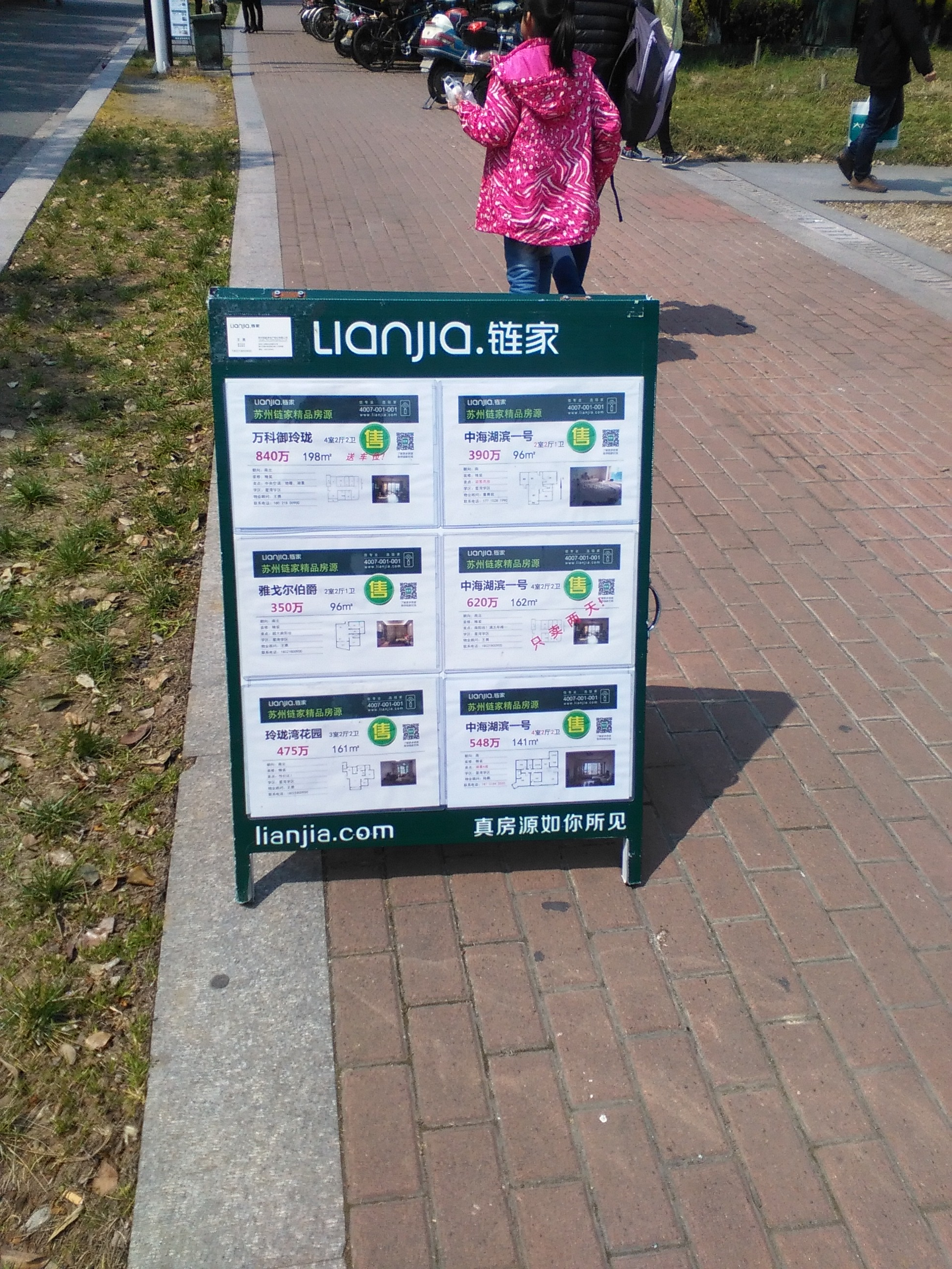 链家地产的房源广告牌